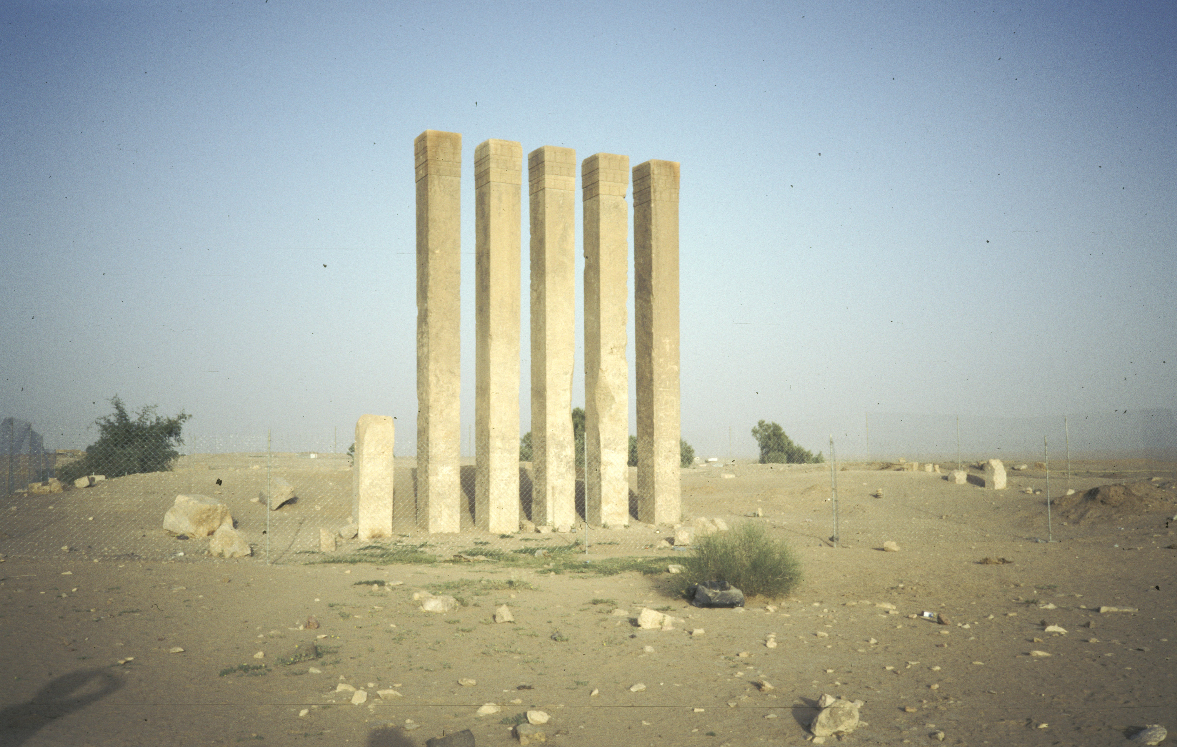 Yemen